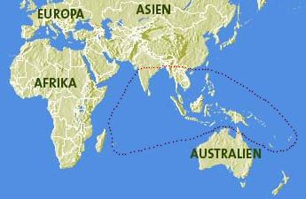 Phyllidae Verbreitungskarte